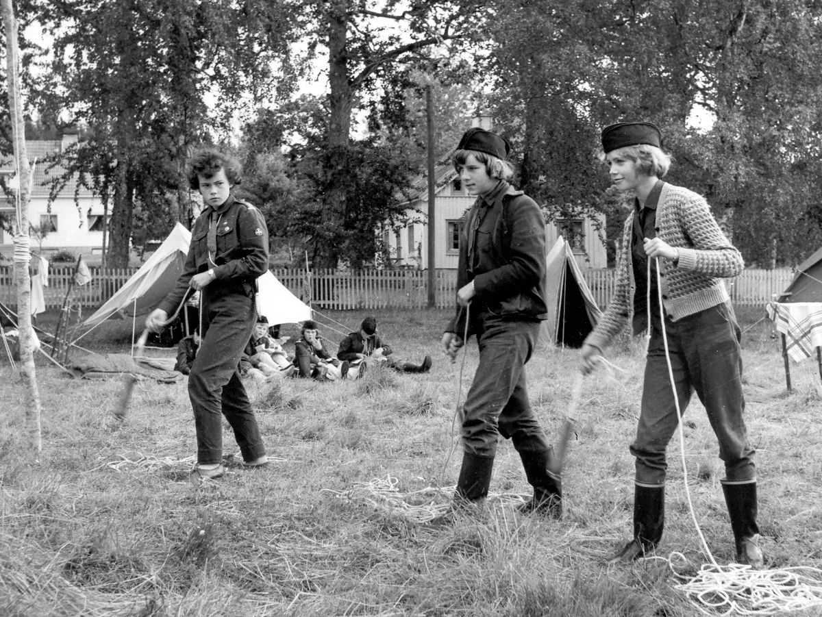 Livlinekastning, 50-tal